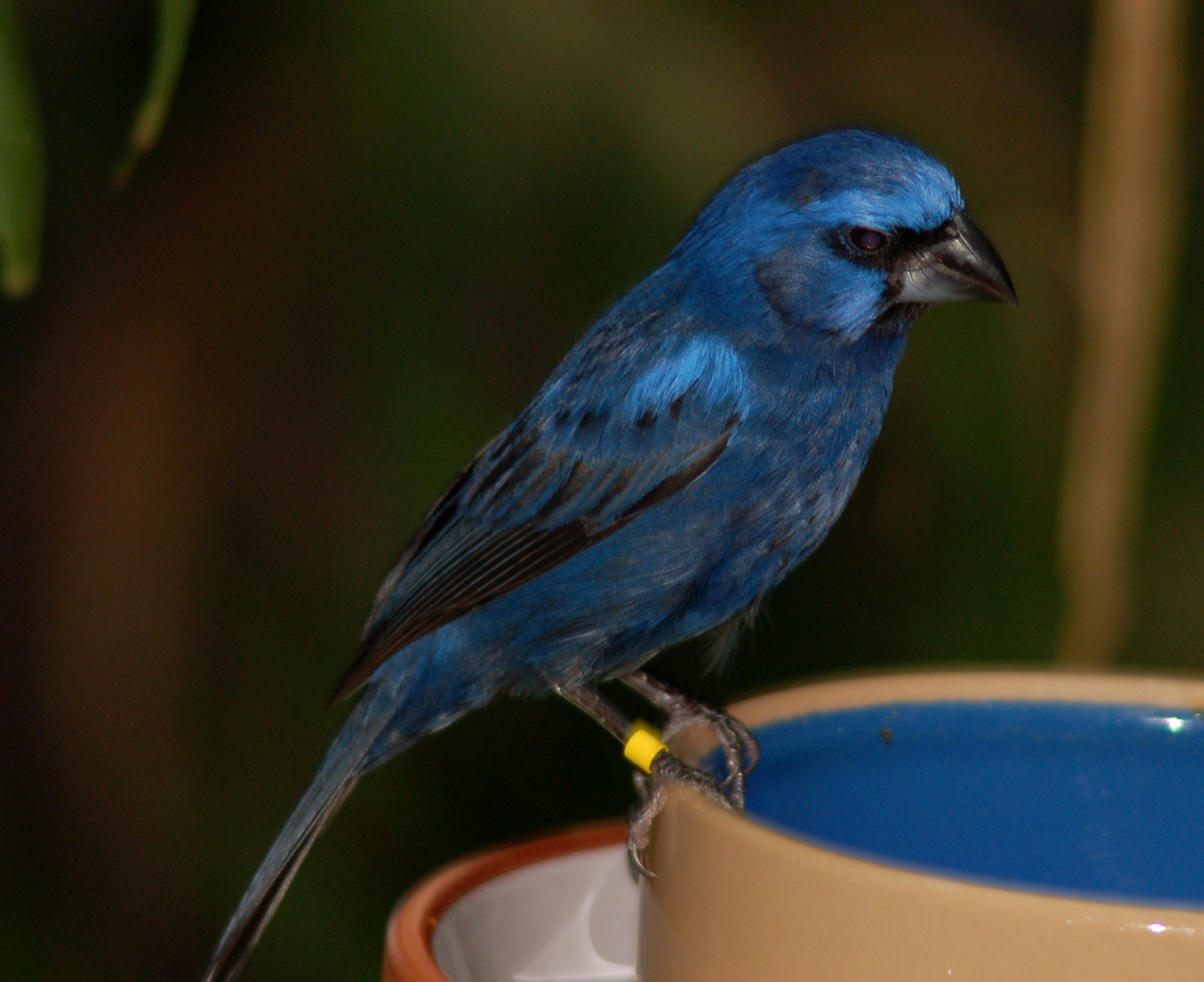 Ultramarinbischof, Männchen